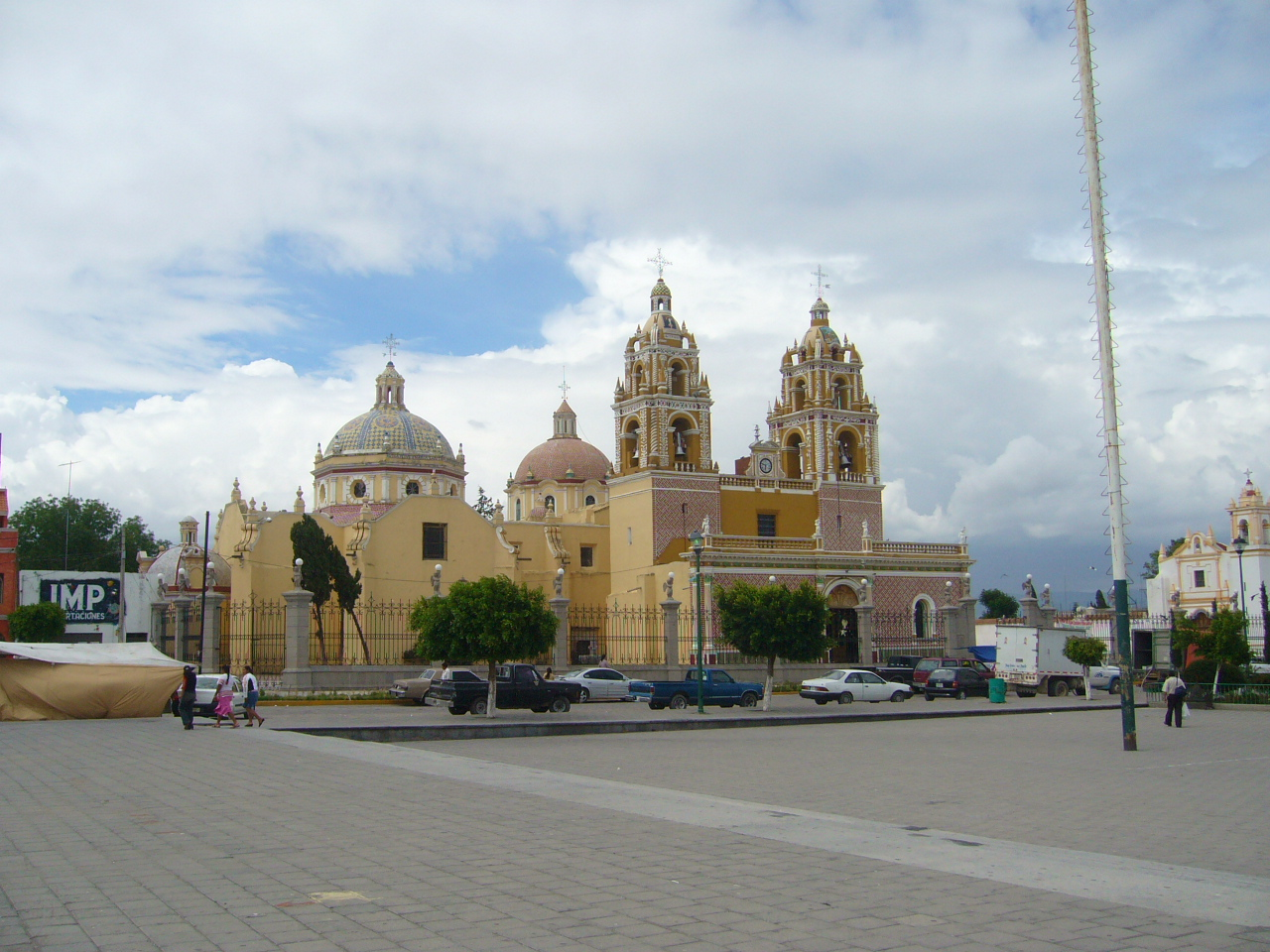 Iglesia de Acatzingo, Puebla, México.